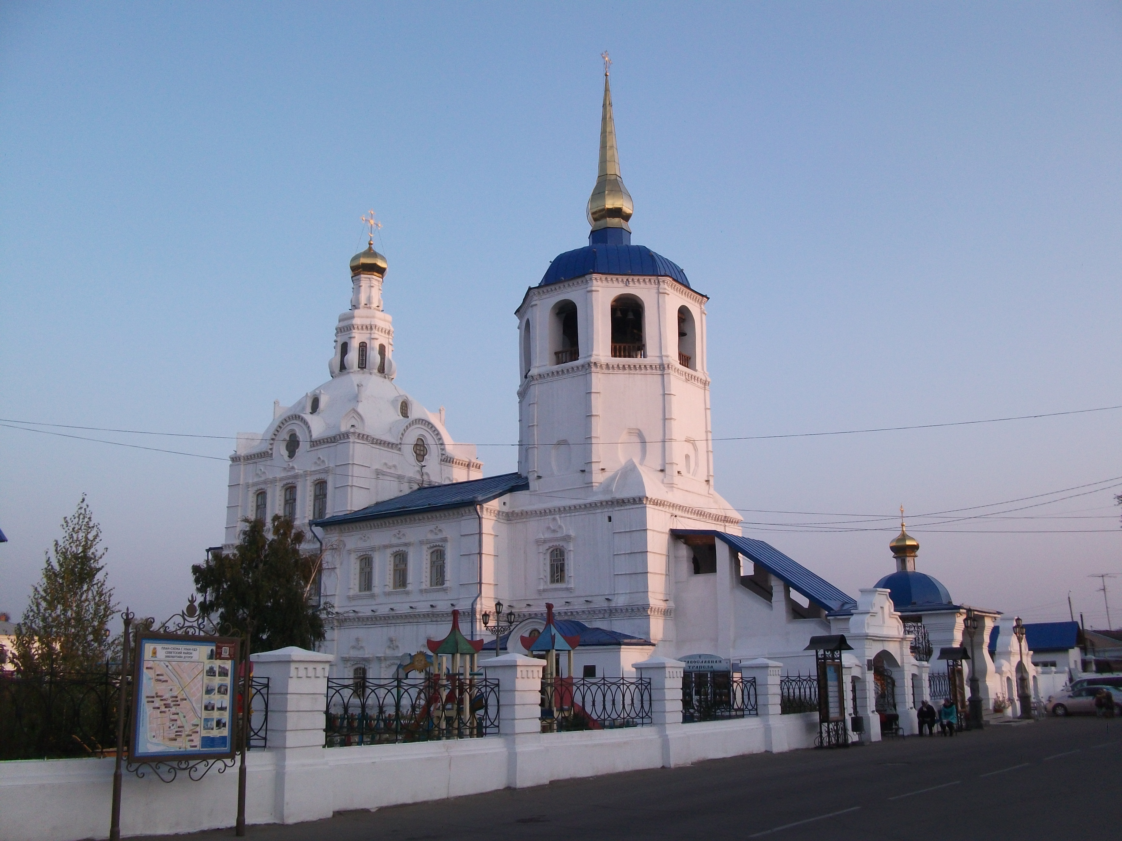 Собор Одигитриевский: улица Ленина, 4, Улан-Удэ, Бурятия